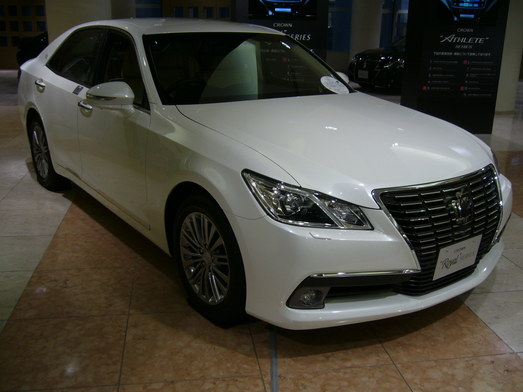 トヨタ・クラウン